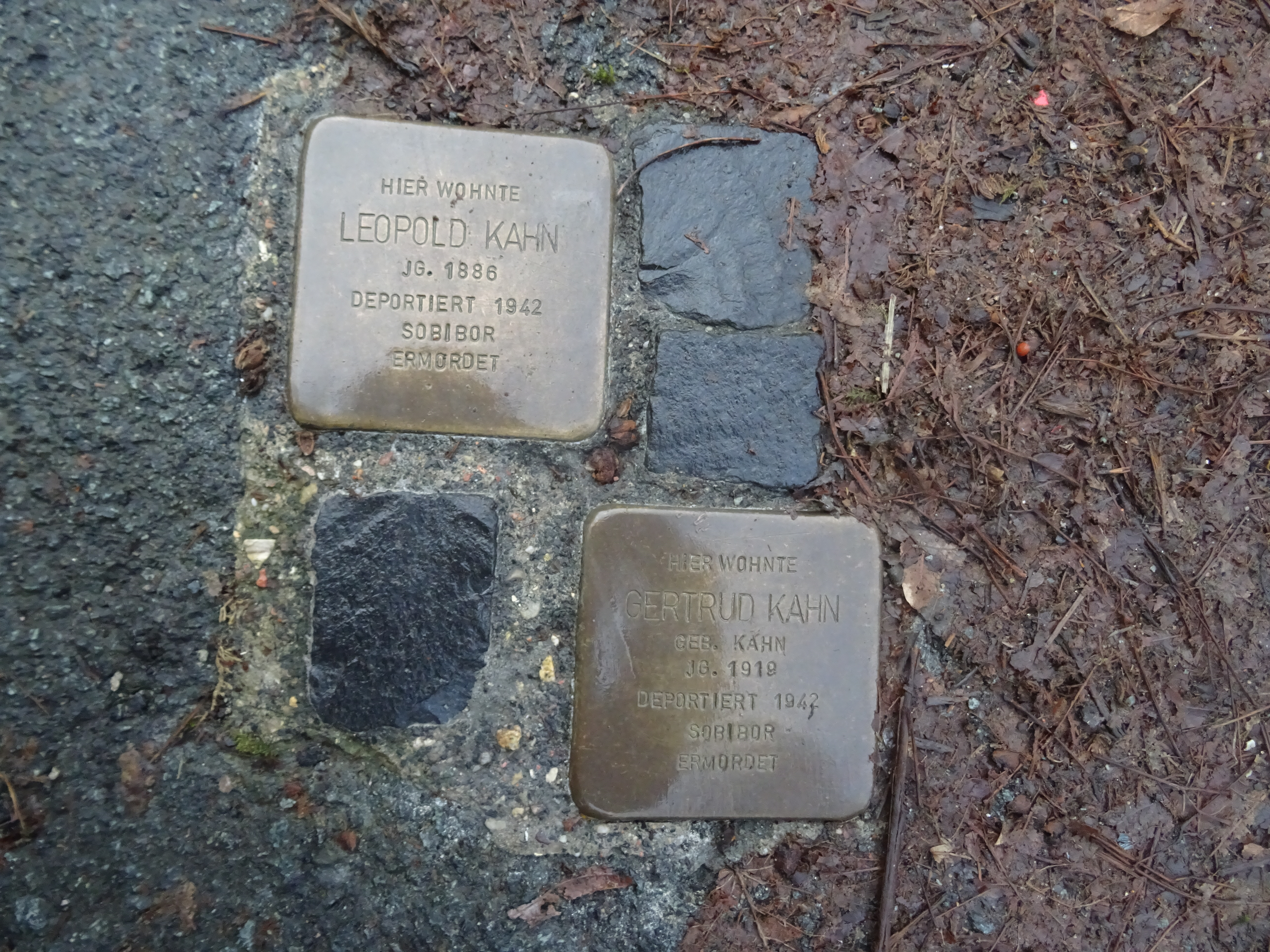 Stolpersteine Biskirchen Auweg 1